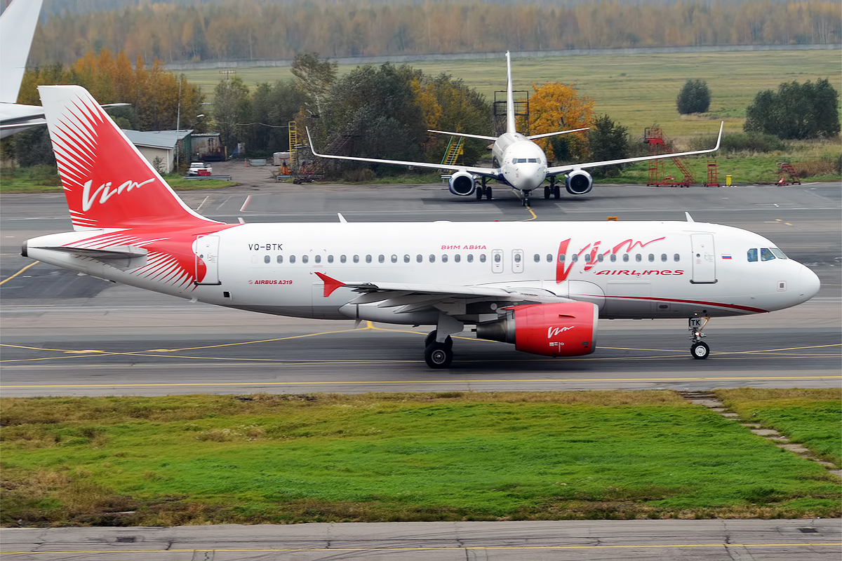 VIM Airlines, VQ-BTK, Airbus A319-111